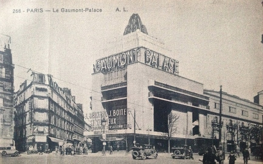 Le Gaumont-Palace de Paris au tout début des années 1930, qui est à l'origine le bâtiment de l'Hippodrome de Montmartre modifié avec une nouvelle façade.